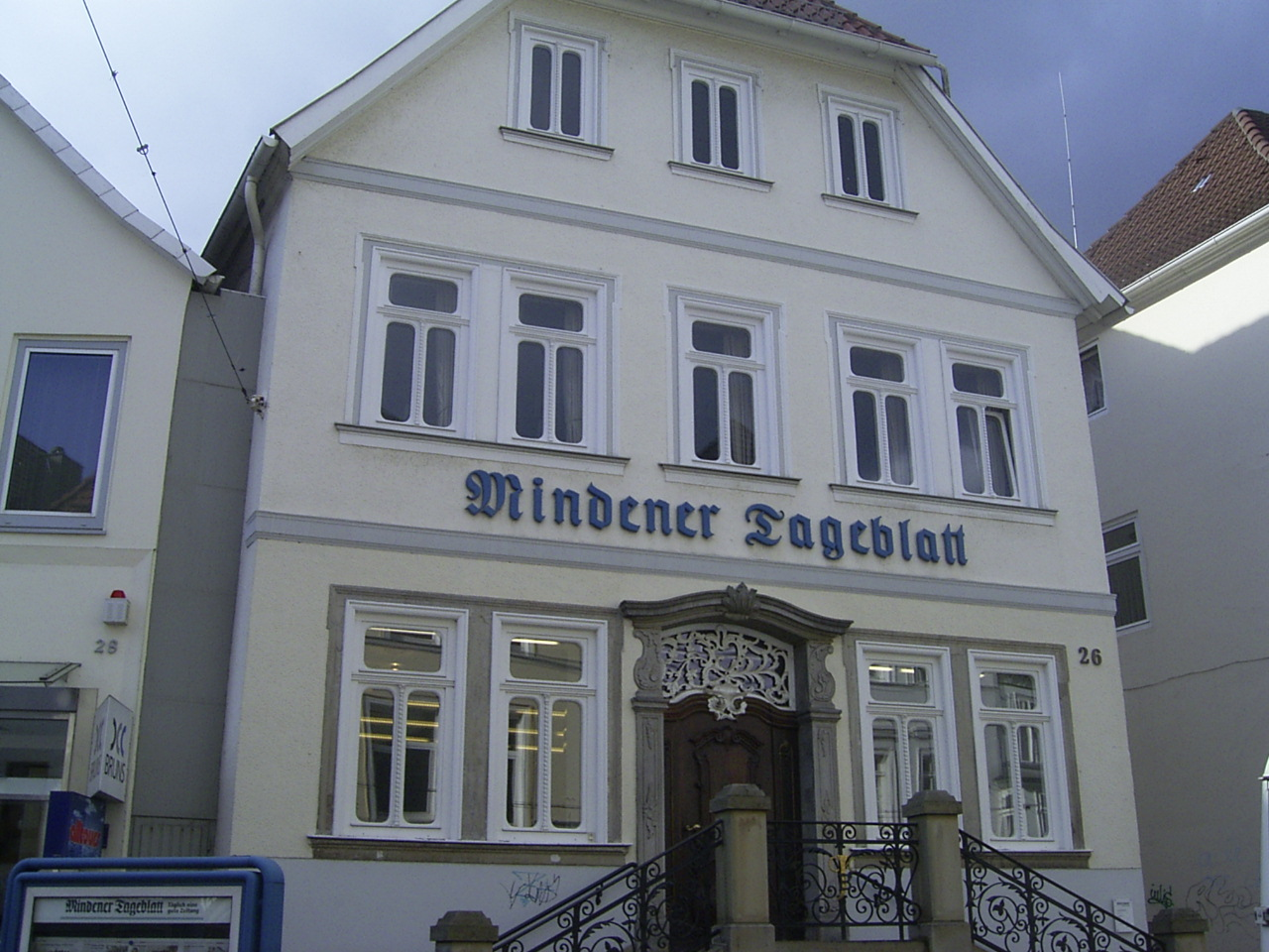 Hauptsitz des Mindener Tageblatts (MT) in Minden, Nordrhein-Westfalen. Das Mindener Tageblatt ist eine unabhängige, überparteiliche, lokal orientierte Tageszeitung. Das Verbreitungsgebiet liegt in Altkreis Minden mit den Städten Petershagen und Porta Westfalica sowie der Gemeinde Hille.